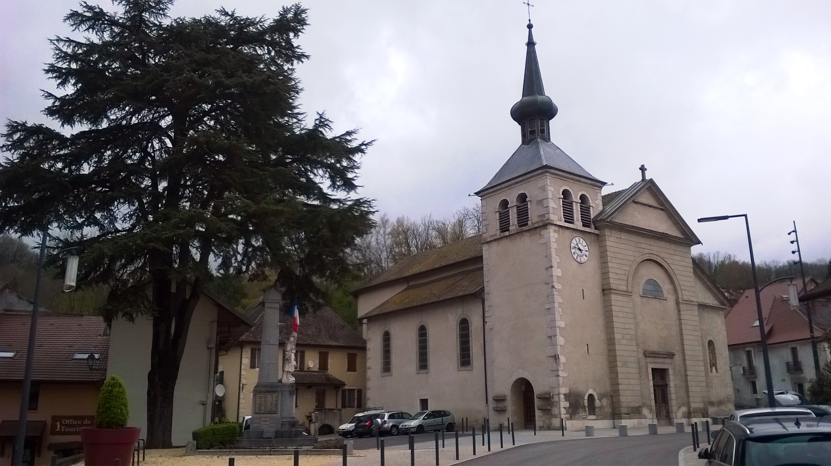 Frangy (Haute-Savoie, France) Église (Saint-Aquilin) et monument aux morts